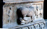 Pórtico de Santa María de Ripoll relieve inferior izquierdo